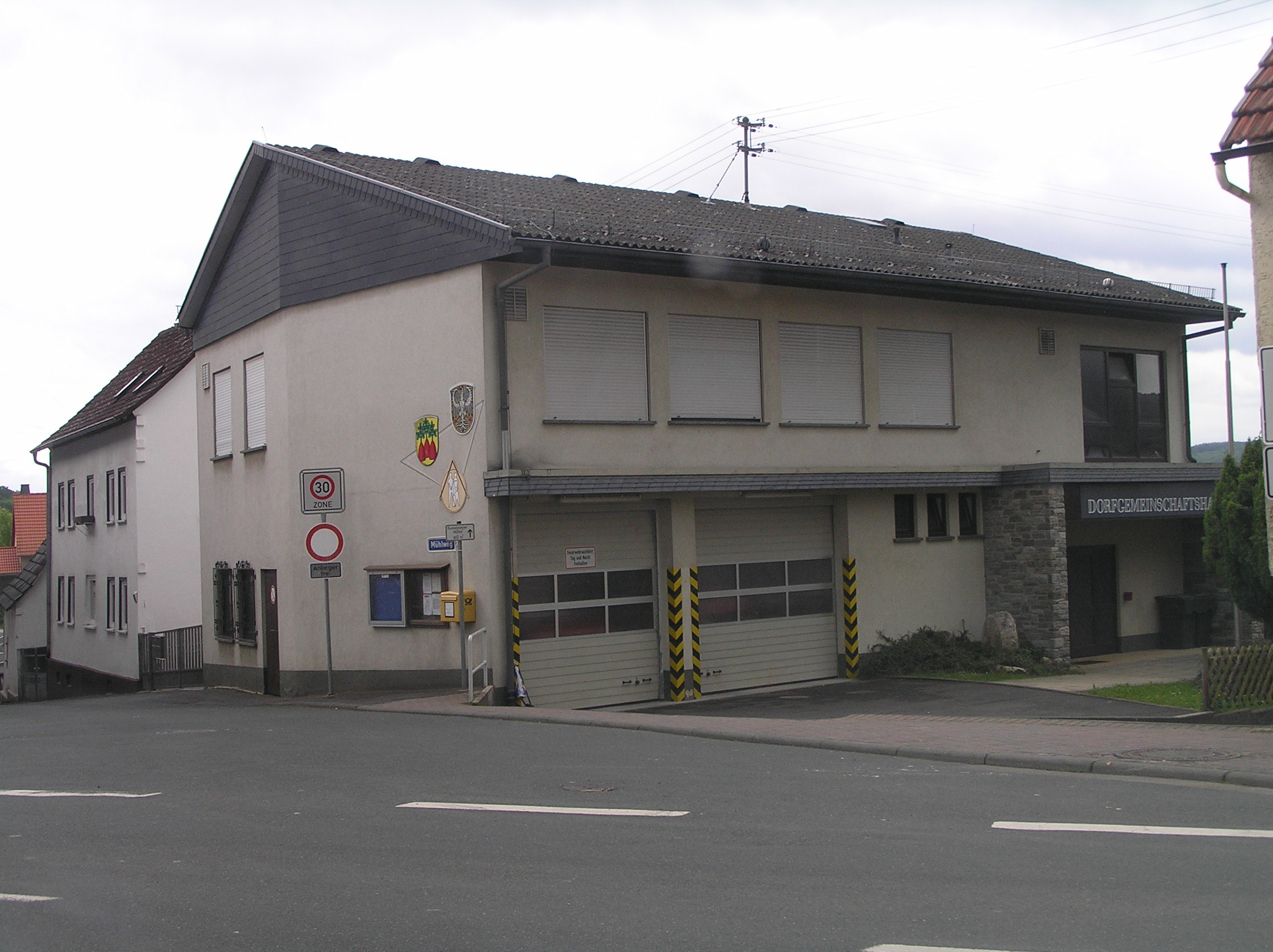 Dorfgemeinschaftshaus in Heinzenberg